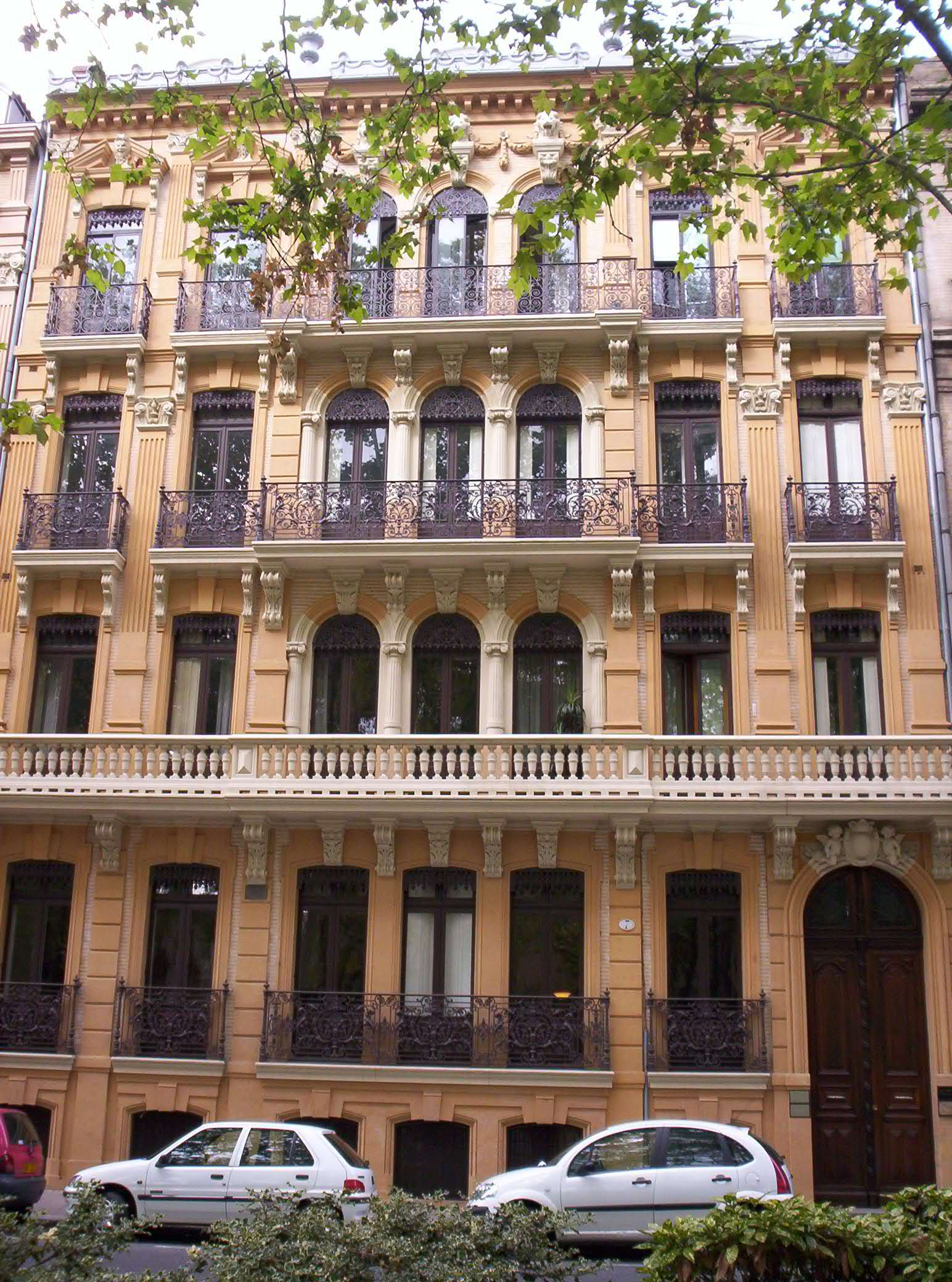 Allées Jules Guesde à Toulouse.